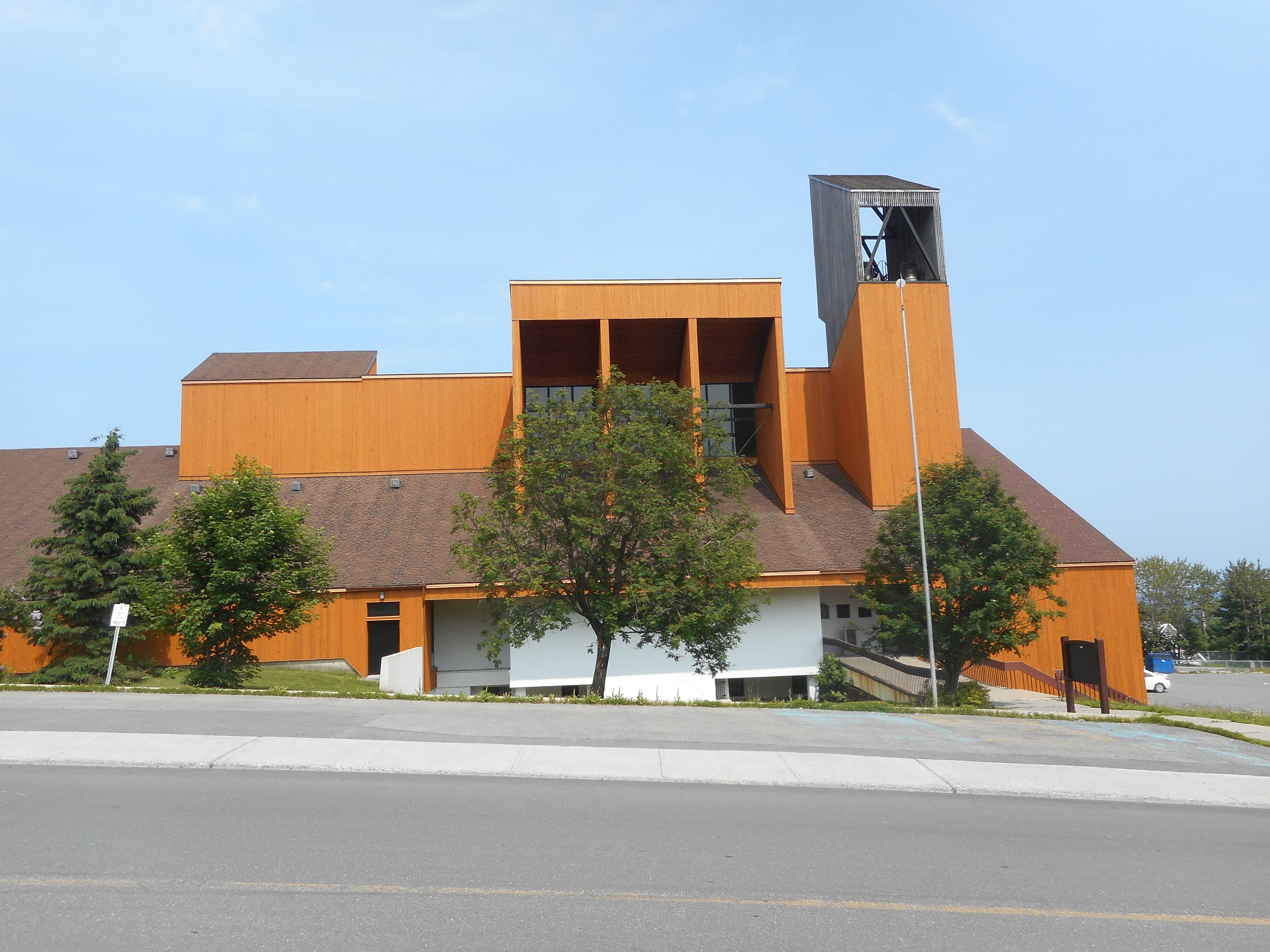 Cathédrale du Christ-Roi de Gaspé